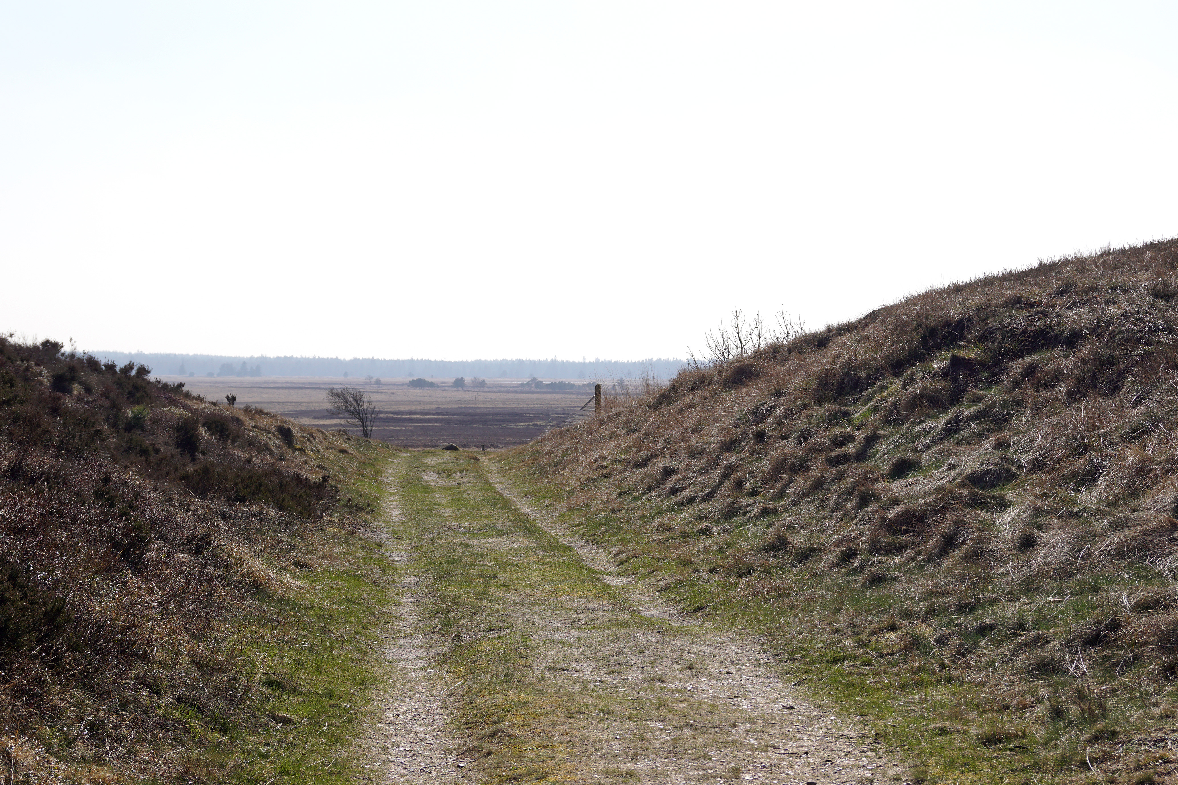 Vorbasse Studevej er en del af hærvejen